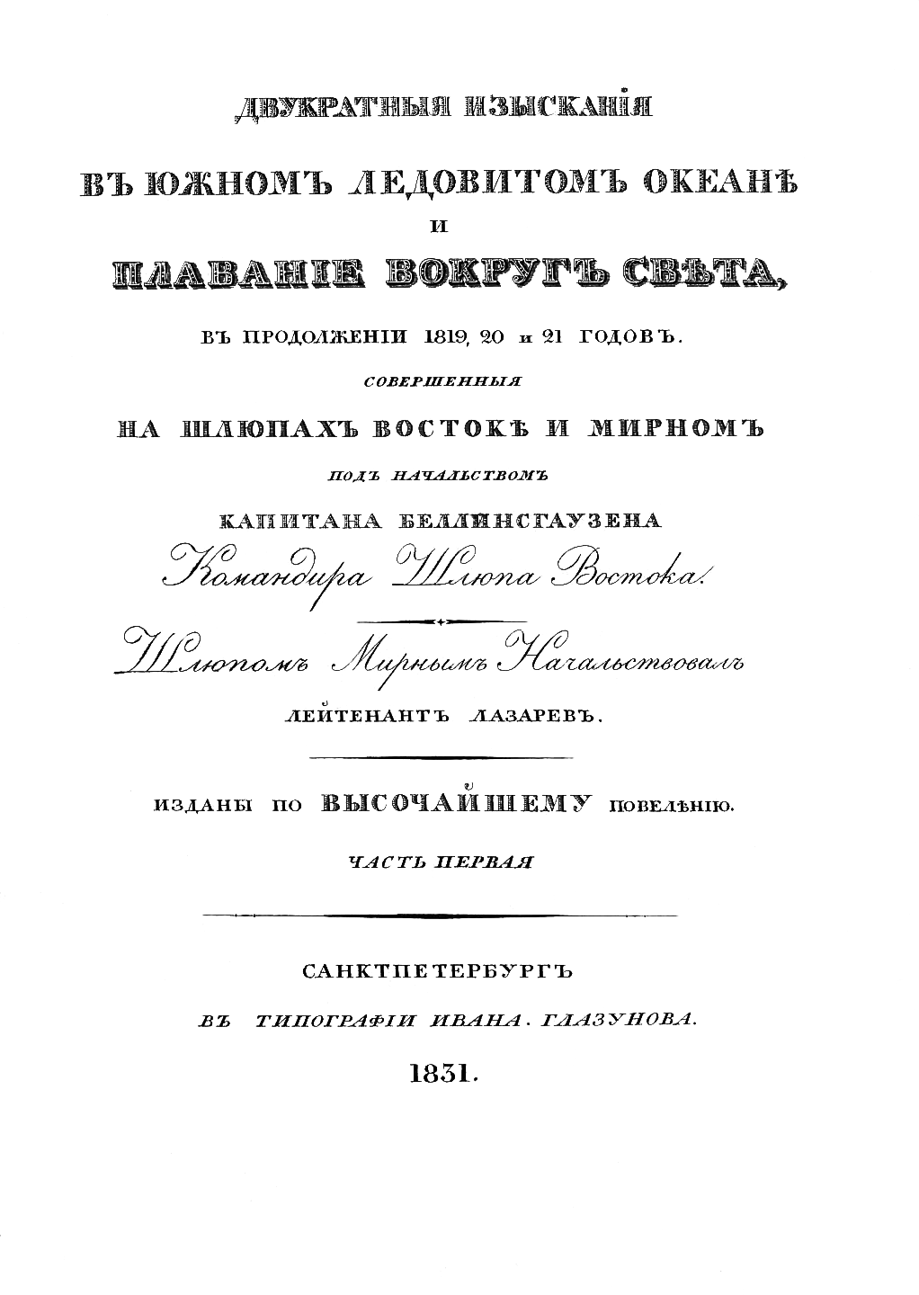 Беллинсгаузен Ф. Ф. Двухкратные изыскания в Южном Ледовитом океане и плавание вокруг света в продолжение 1819, 20 и 21 годов, совершенные на шлюпах «Востоке» и «Мирном» под начальством капитана Беллинсгаузена командира шлюпа «Восток».